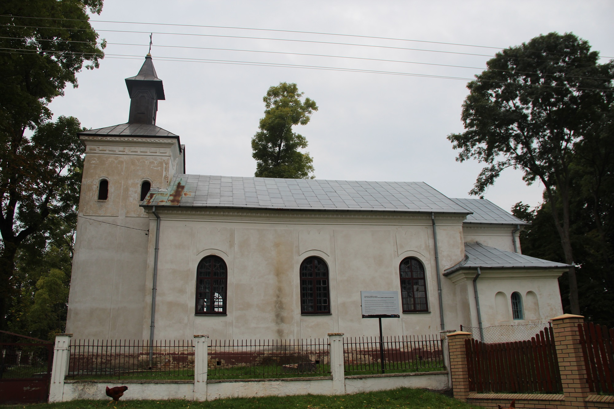 Uhrusk, cerkiew prawosławna par. p.w. Wniebowzięcia NMP, 1849